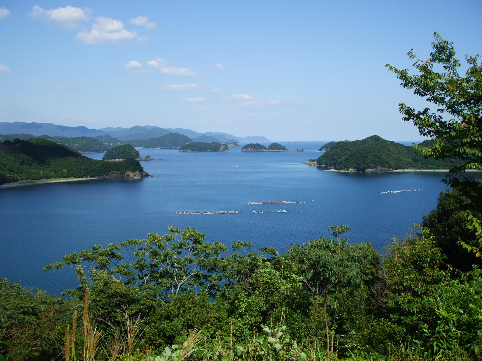 三重県紀北町の熊野灘